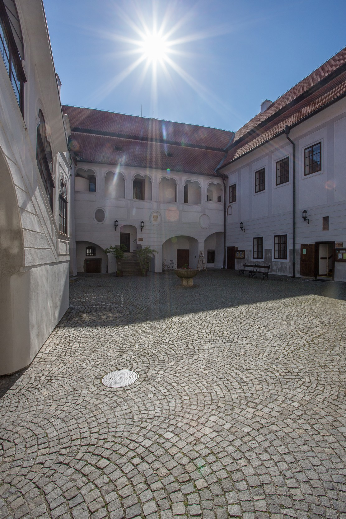 foto 1